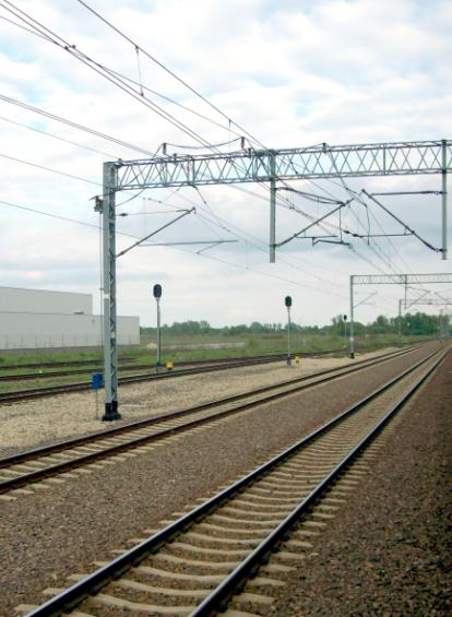 Zmodernizowany odcinek linii kolejowej E 30.